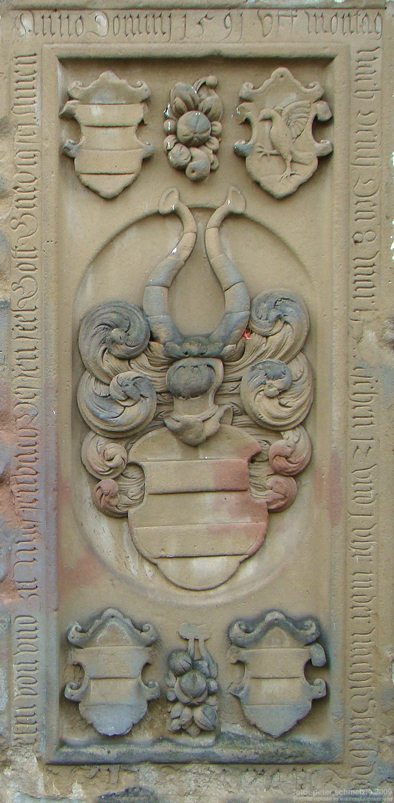 Grabplatte des Christoph Wilhelm von Massenbach (†1591) an der Georgskirche in Schwaigern-Massenbach, von Jakob Müller (siehe Peter Beisel: Jakob Müller. Ein Bildhauer und Baumeister, der Neckarbischofsheim geprägt hat. In: Kraichgau. Beiträge zur Landschafts- und Heimatforschung, Folge 18/2003, S. 123−130, Hrsg. vom Heimatverein Kraichgau, Eppingen 2003, ISBN 3-921214-28-9)